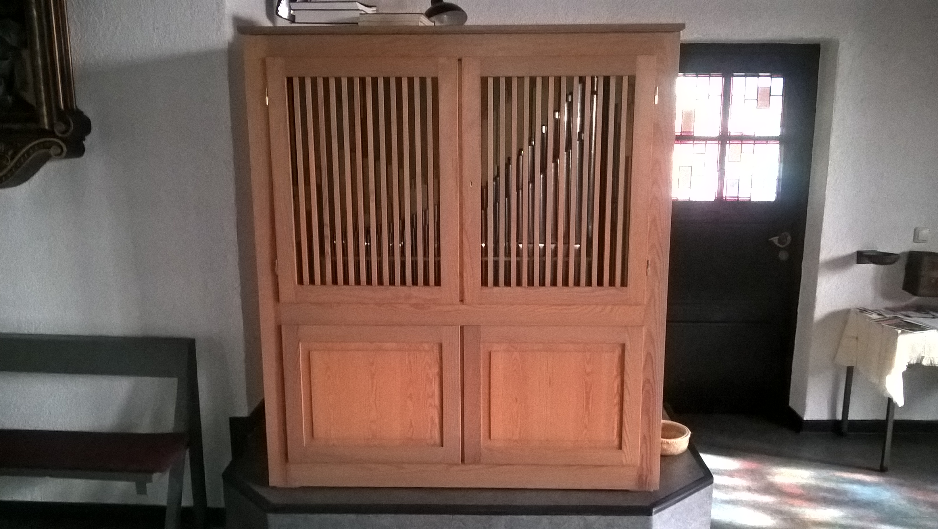 St. Maria Immaculata, Lich-Eberstadt, Landkreis Gießen, Hessen, Deutschland